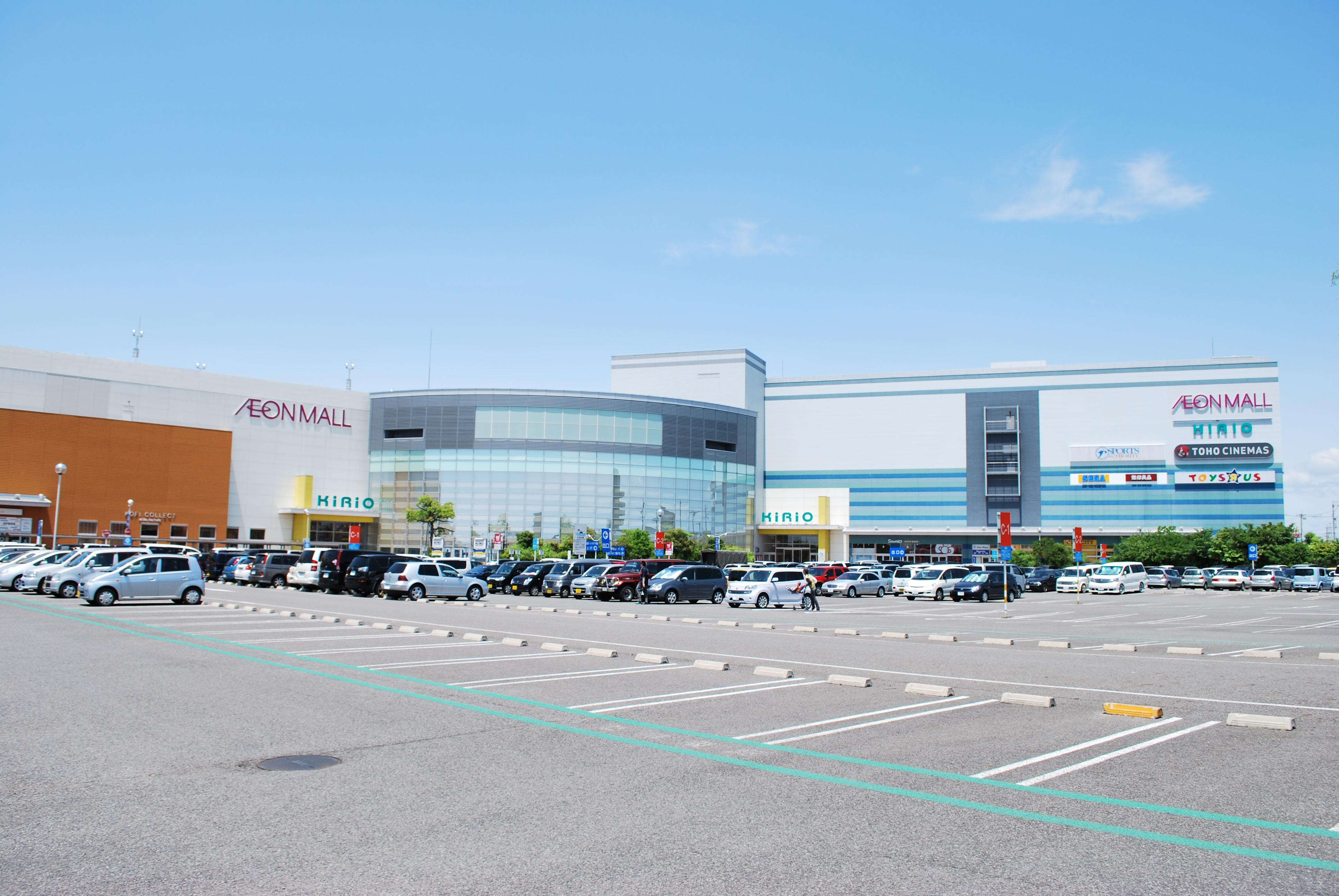 イオンモール木曽川キリオ（専門店棟）。